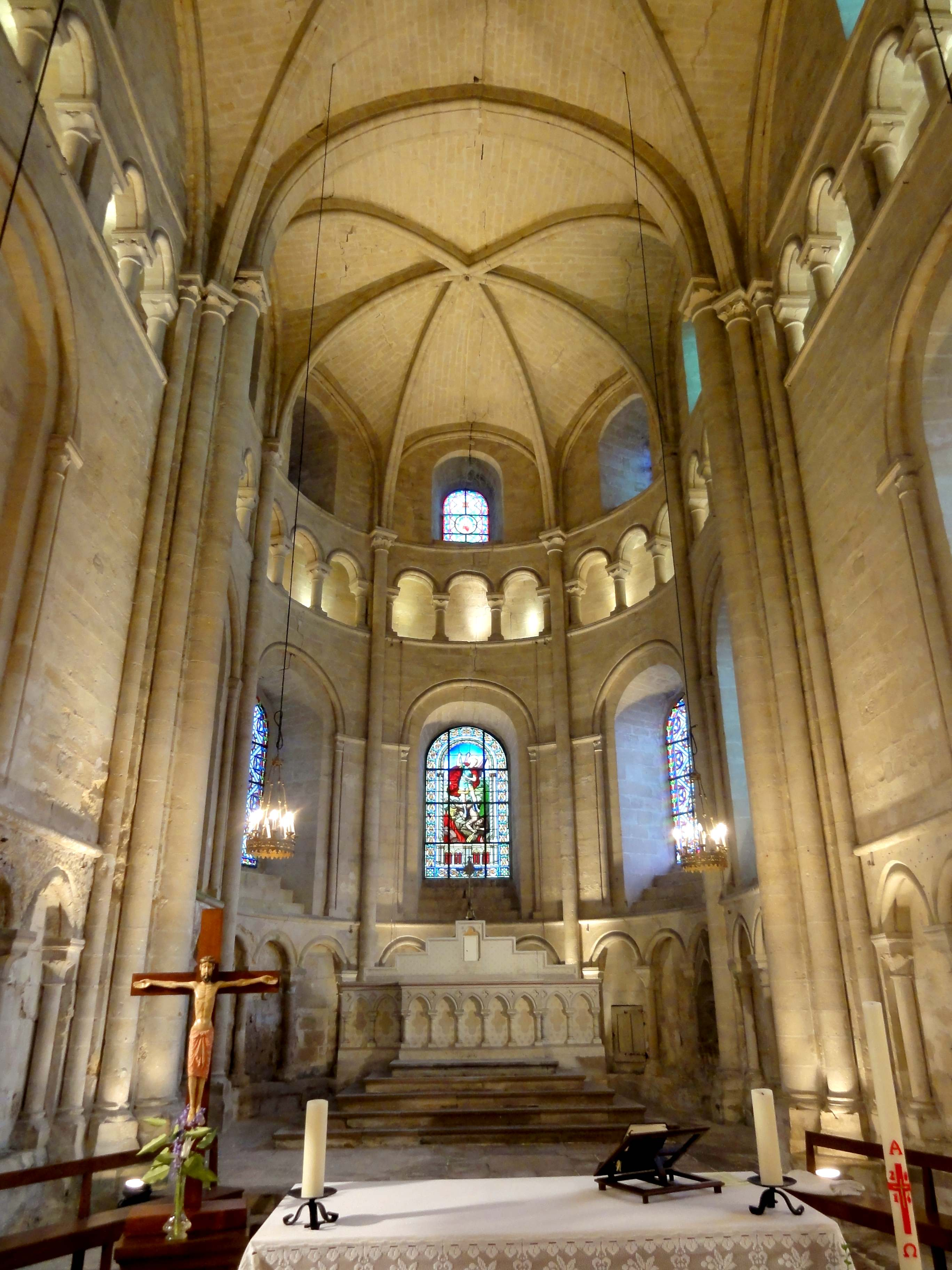 Intérieur de l'église - voir titre.